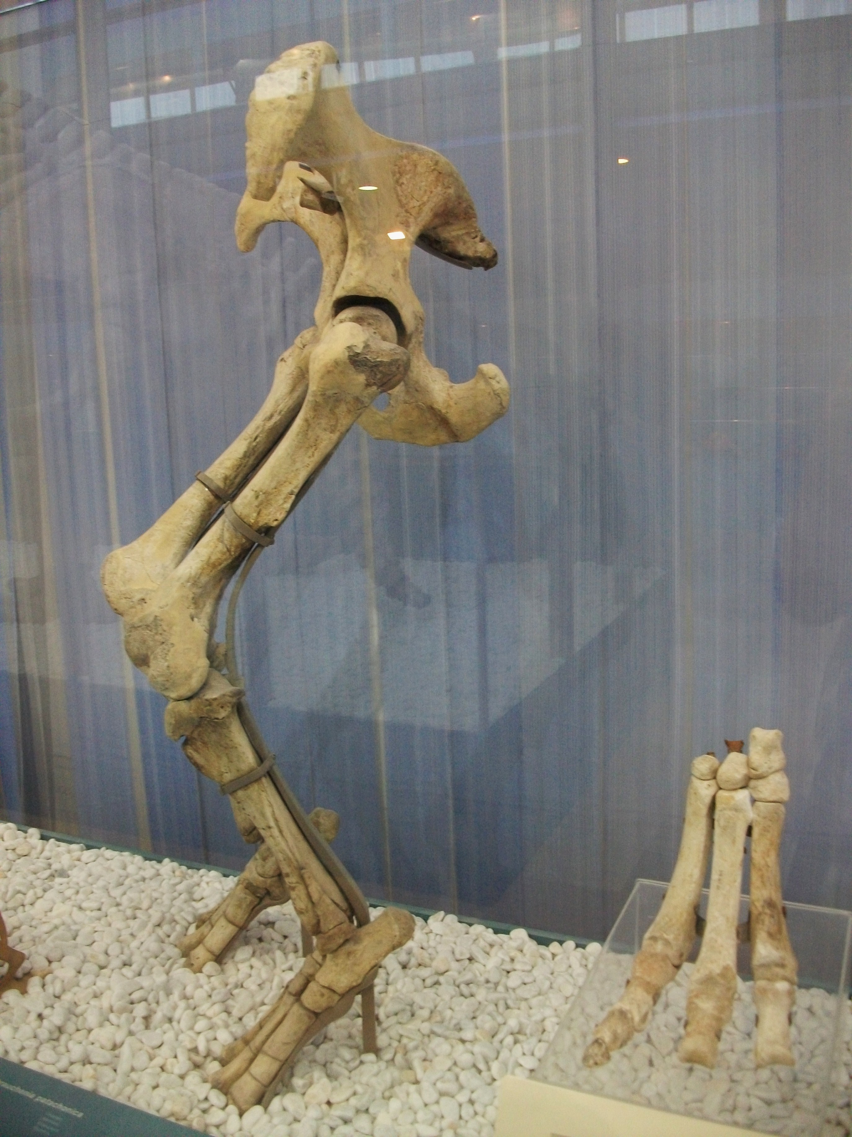 Machrauchenia patachonica, liptoptern, Museu de Ciències Naturals de València.